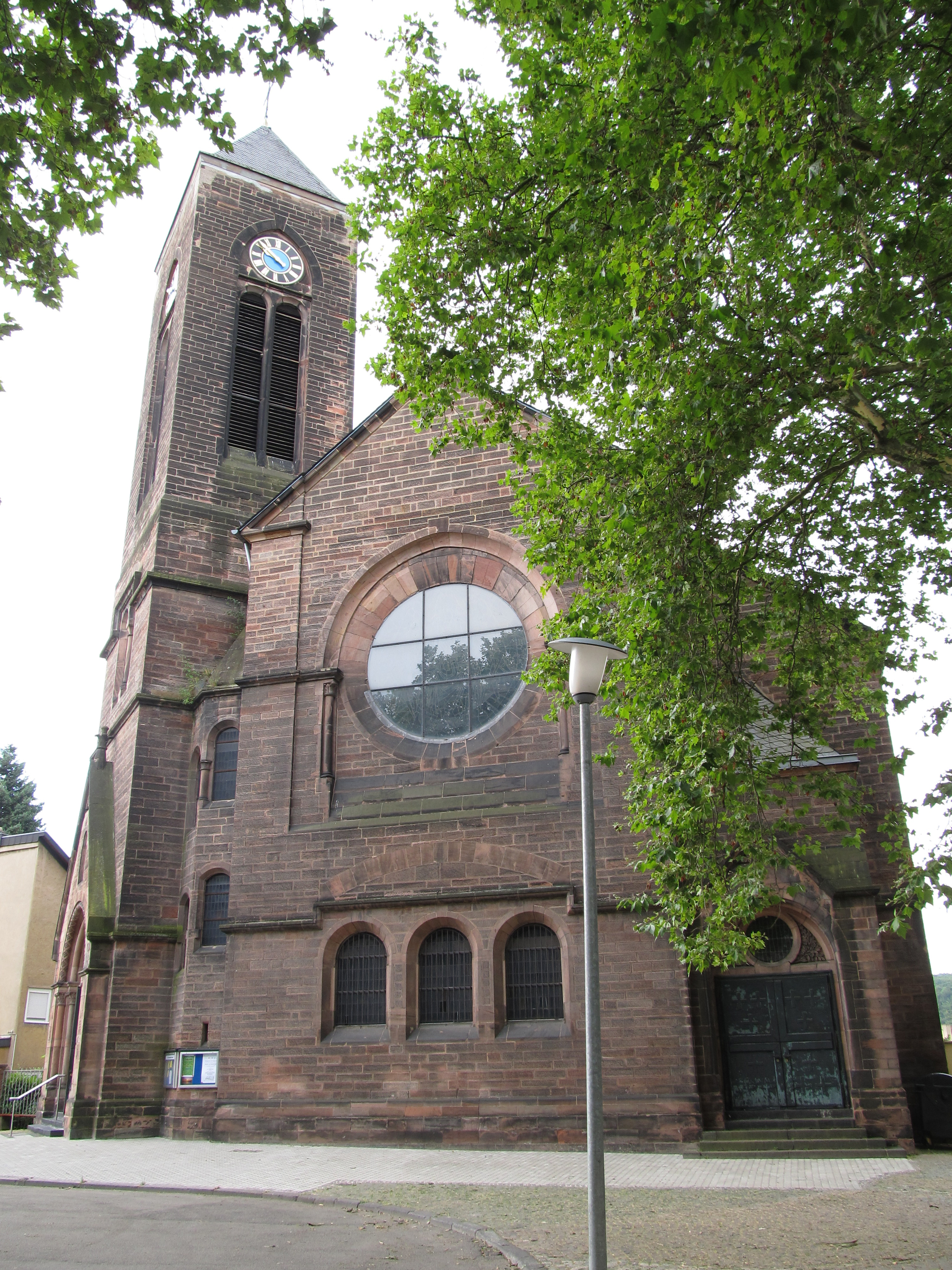 Evangelische Matthäuskirche, Burbach, Saarbrücken, Saarland